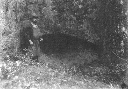 Briord. entrée NE (côté de la prise d'eau de la Brivaz) du tunnel-aqueduc romain. Etat vers 1900, semi-obstruée.